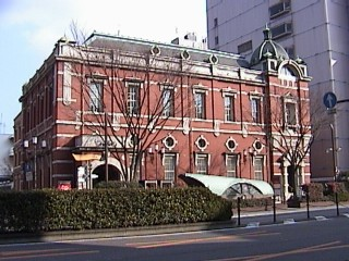 Photograph at OitaBank Akarengakan in Oita City, Oita Prefecture, Japan